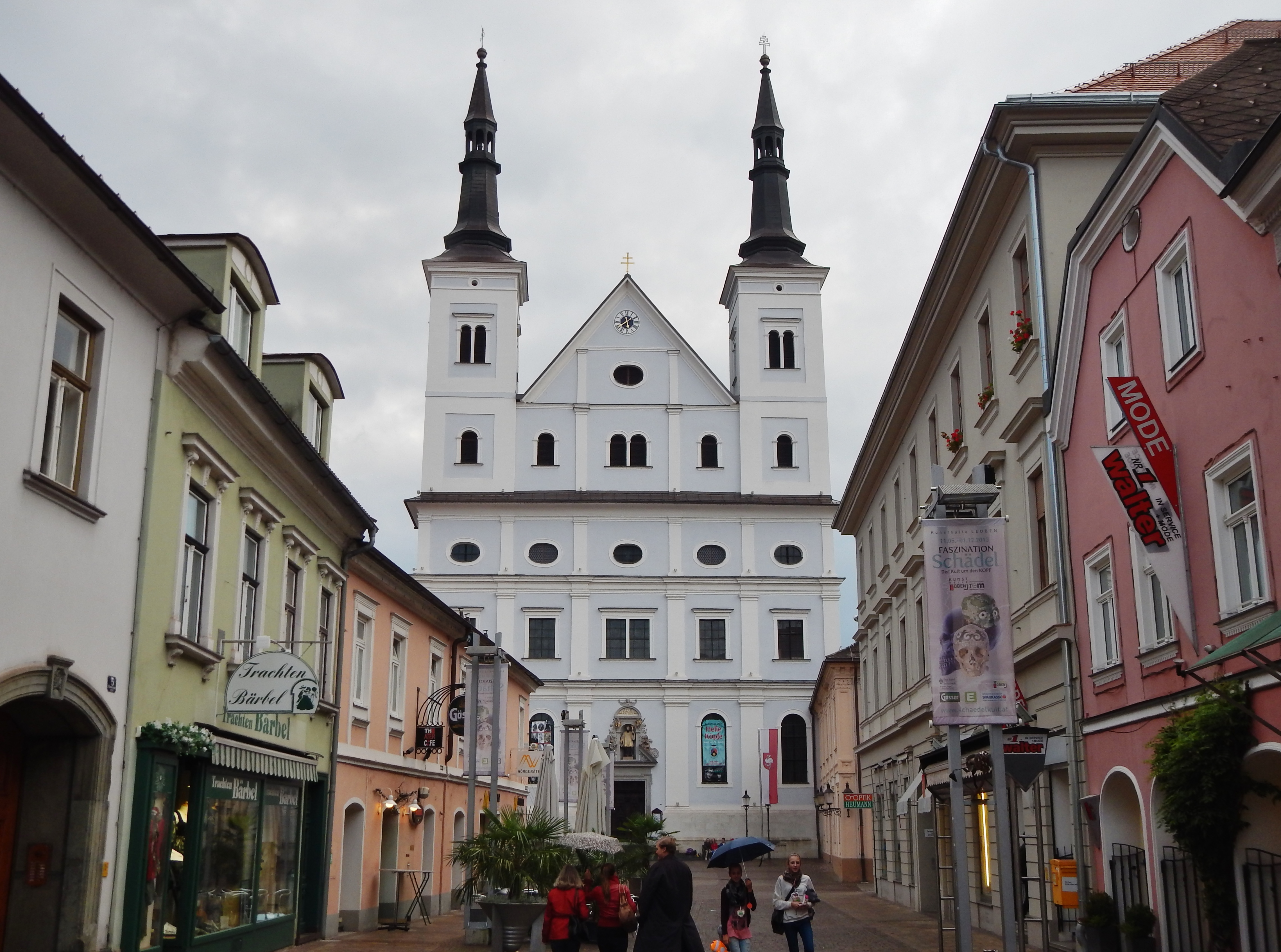 Stadtpfarrkirche Sankt Xaver in Leoben